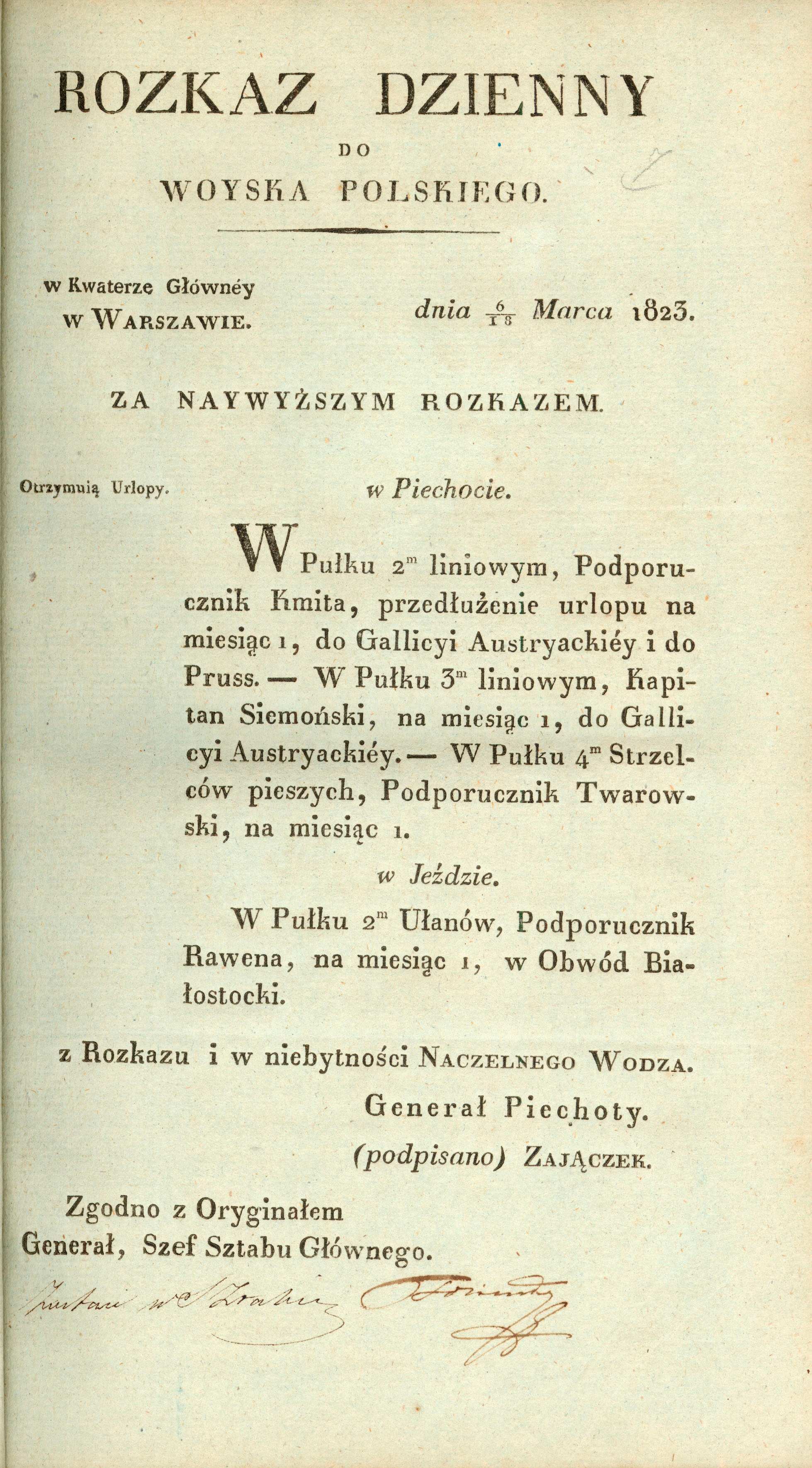 Rozkaz urlopowy kapitana Gabriela Siemońskiego